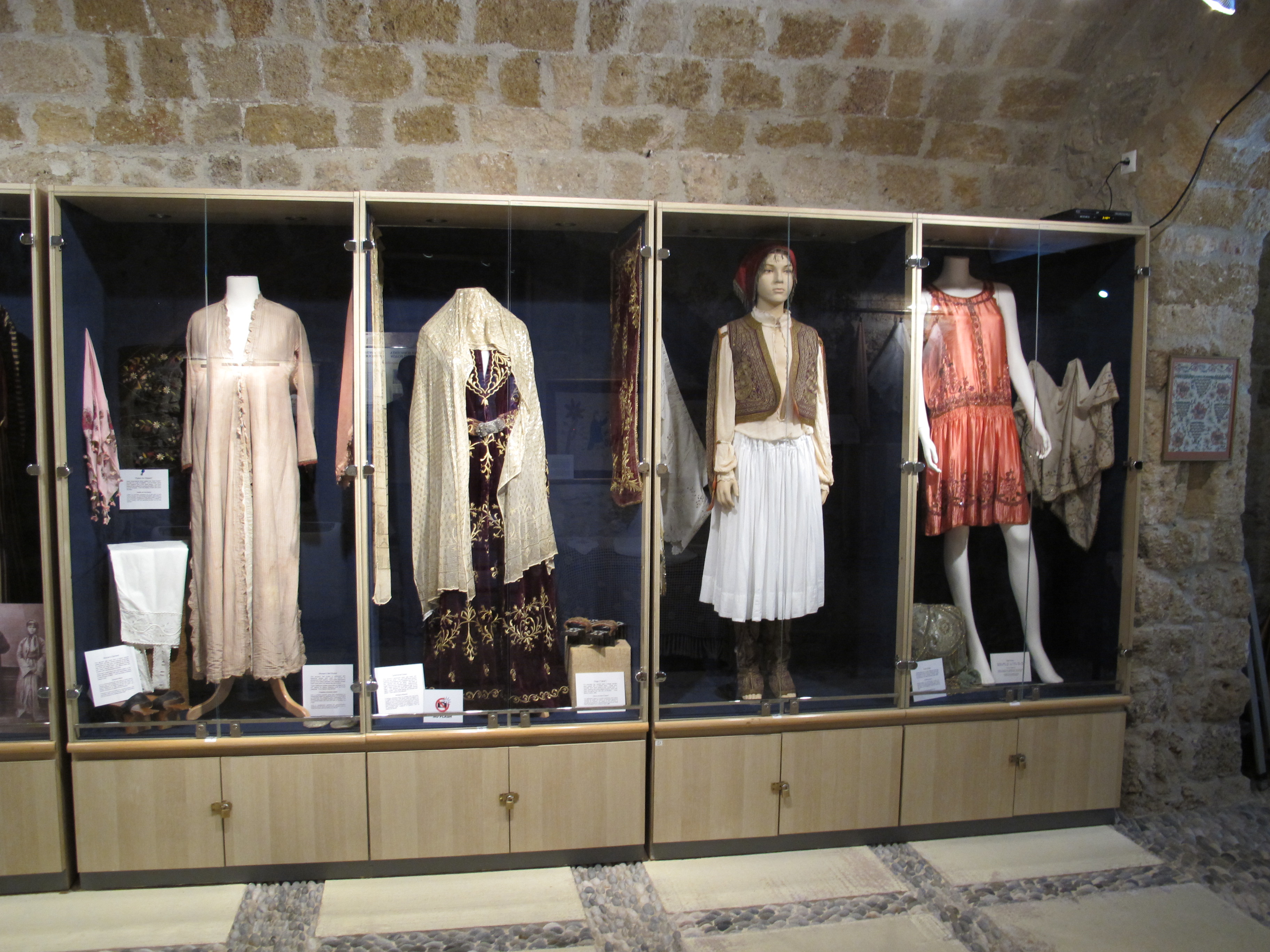 Rosi, Kahal Shalom Synagogue, museo, abiti